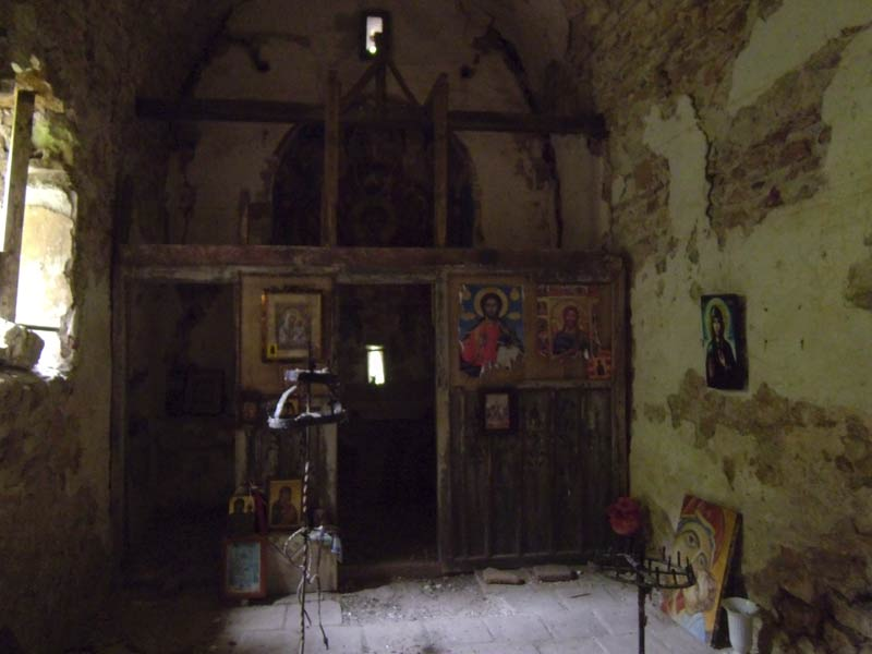 Олтарът на манастира